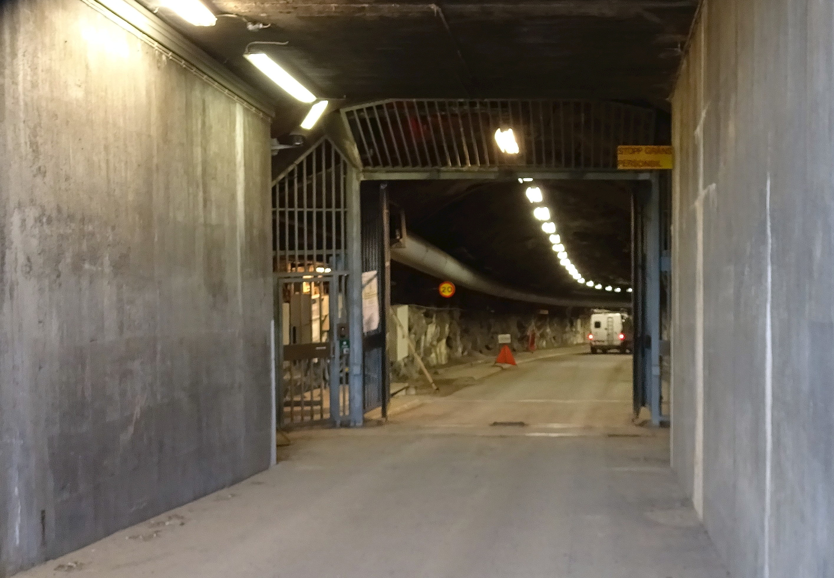 Nerfart till Hammarby telestation i berget under Hammarbytornet